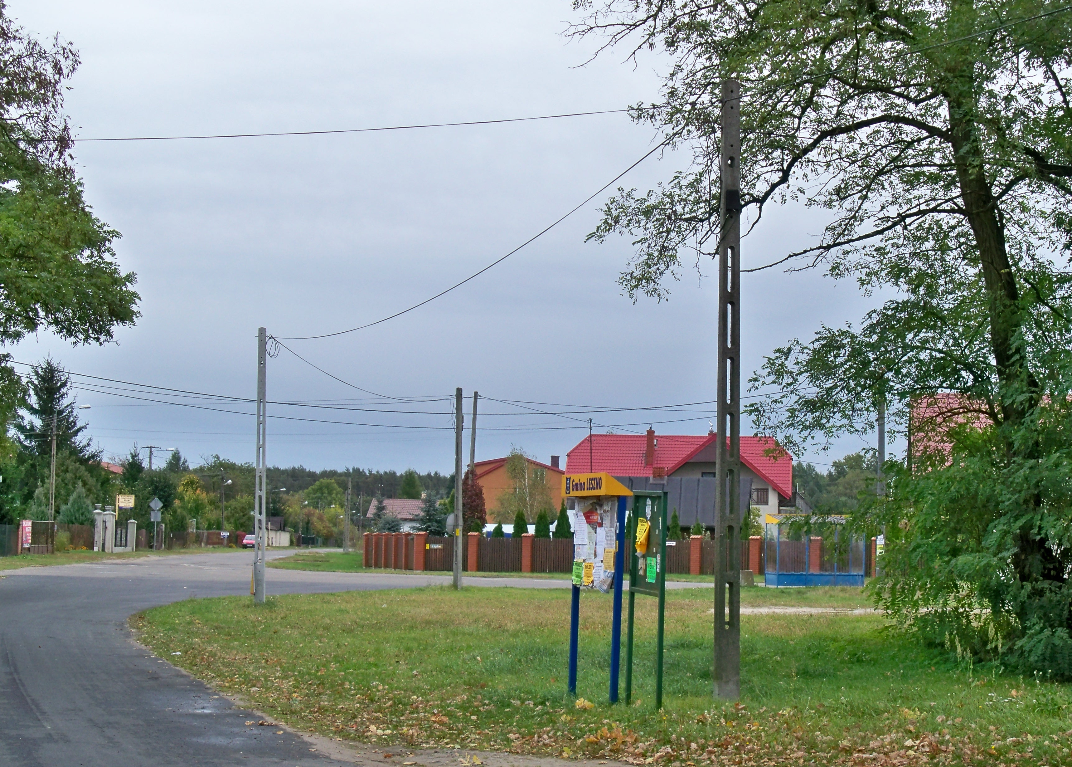 Wólka (gmina Leszno), skraj Kampinoskiego Parku Narodowego. Centrum wsi.